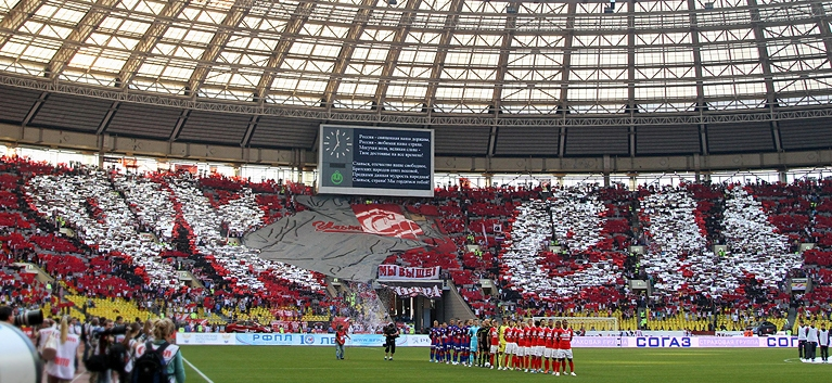 Сложный перфоманс "ФКСМ" на матче против ЦСКА. 2011 год